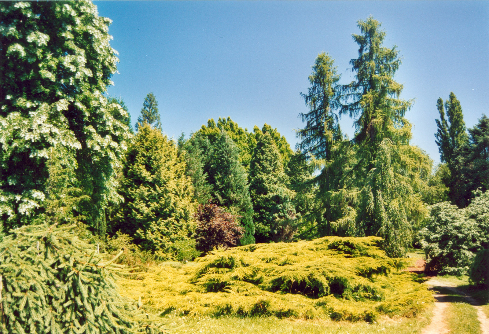 Arboretum national des Barres, Nogent-sur-Vernisson, Loiret, Centre, France.